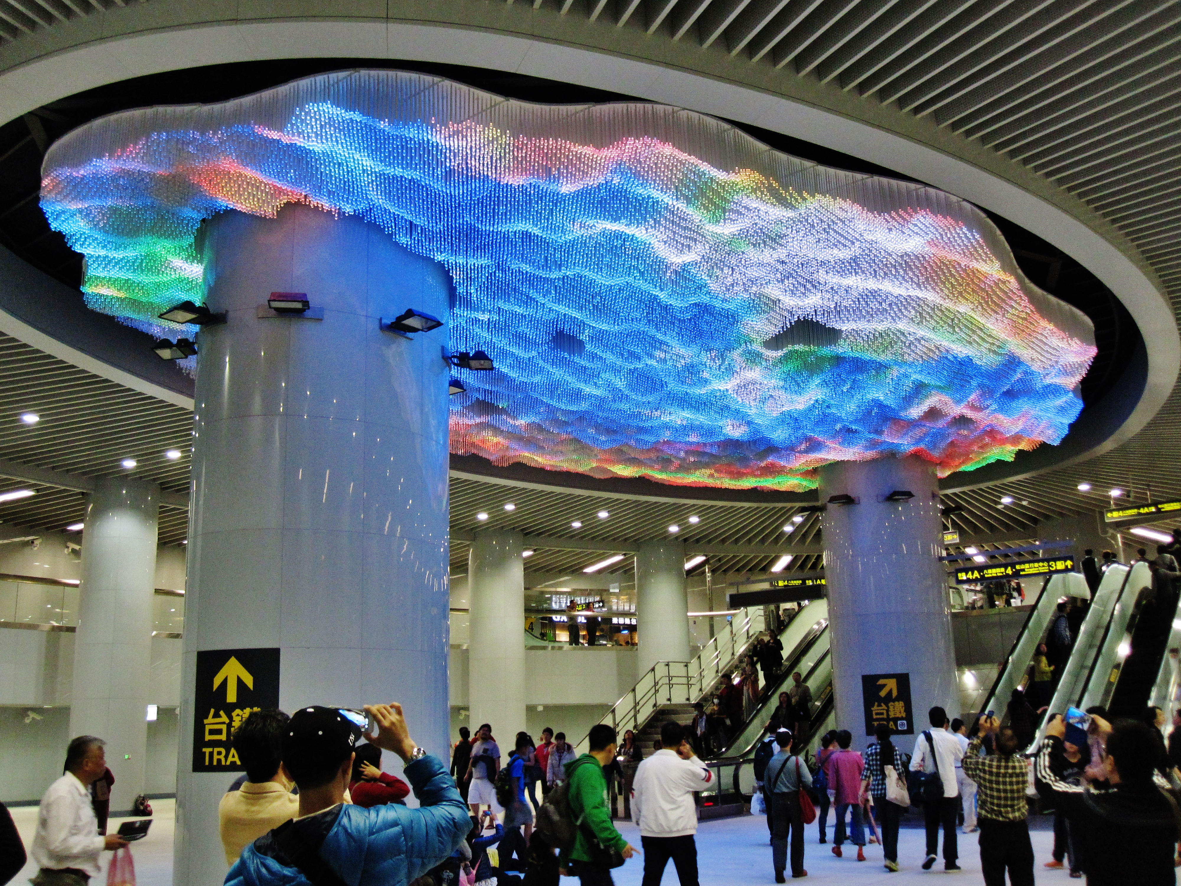 台北捷運松山站公共藝術《河流彎曲之處，域見繁花光穹》。